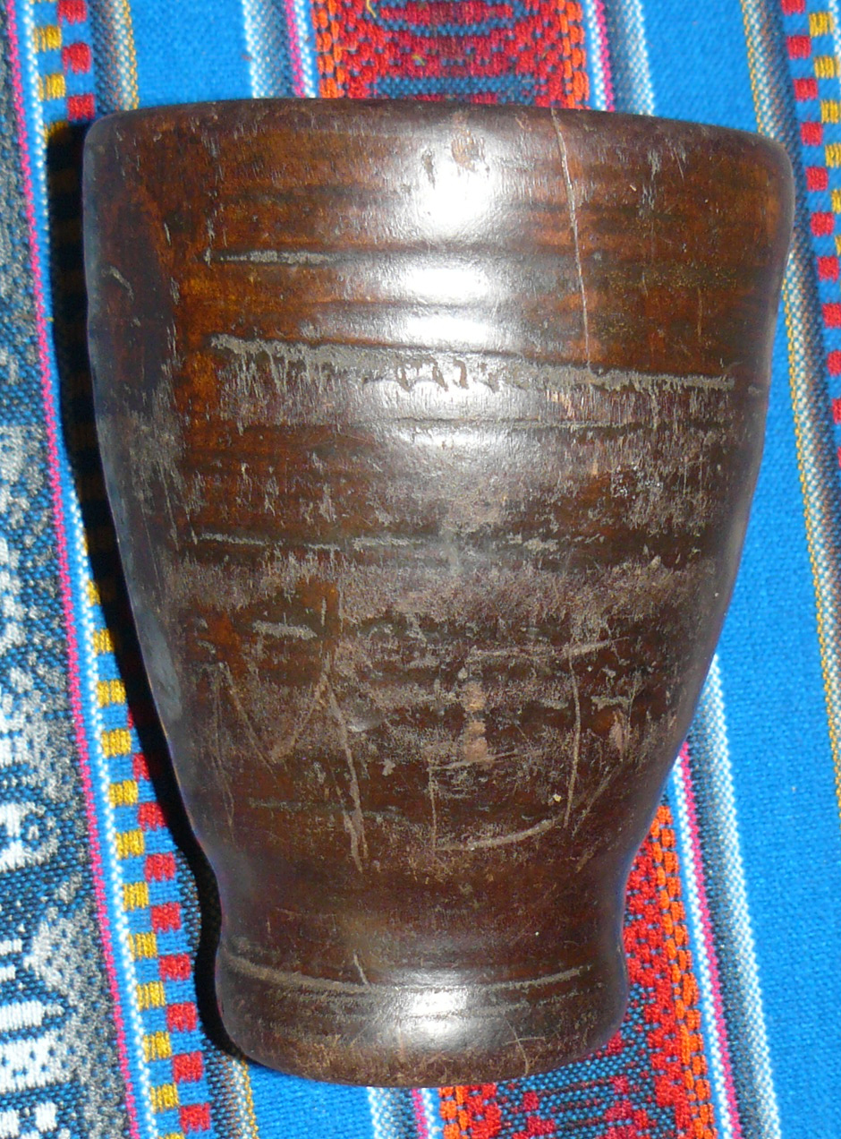 Q'ero, kero cup (Peruvian wooden cup)